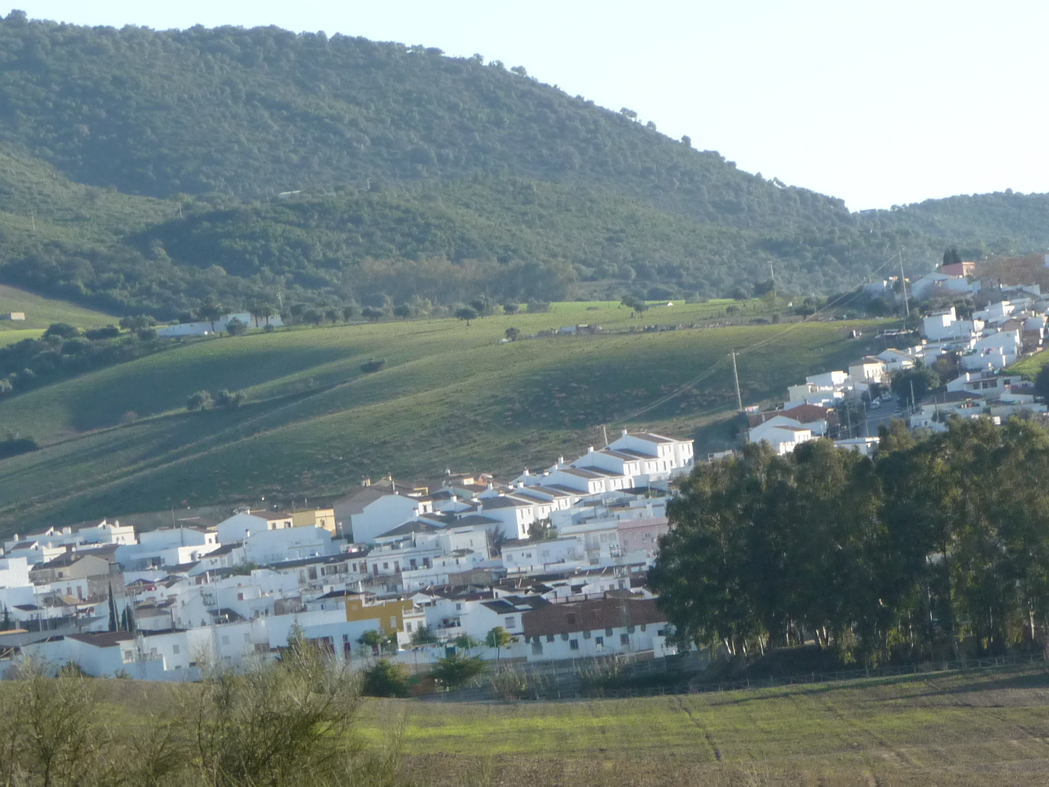 SanJoseDelValle-P1060370.JPG